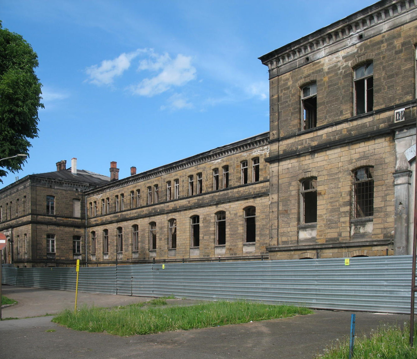 Lubawka (Liebau), Bahnhofsgebäude